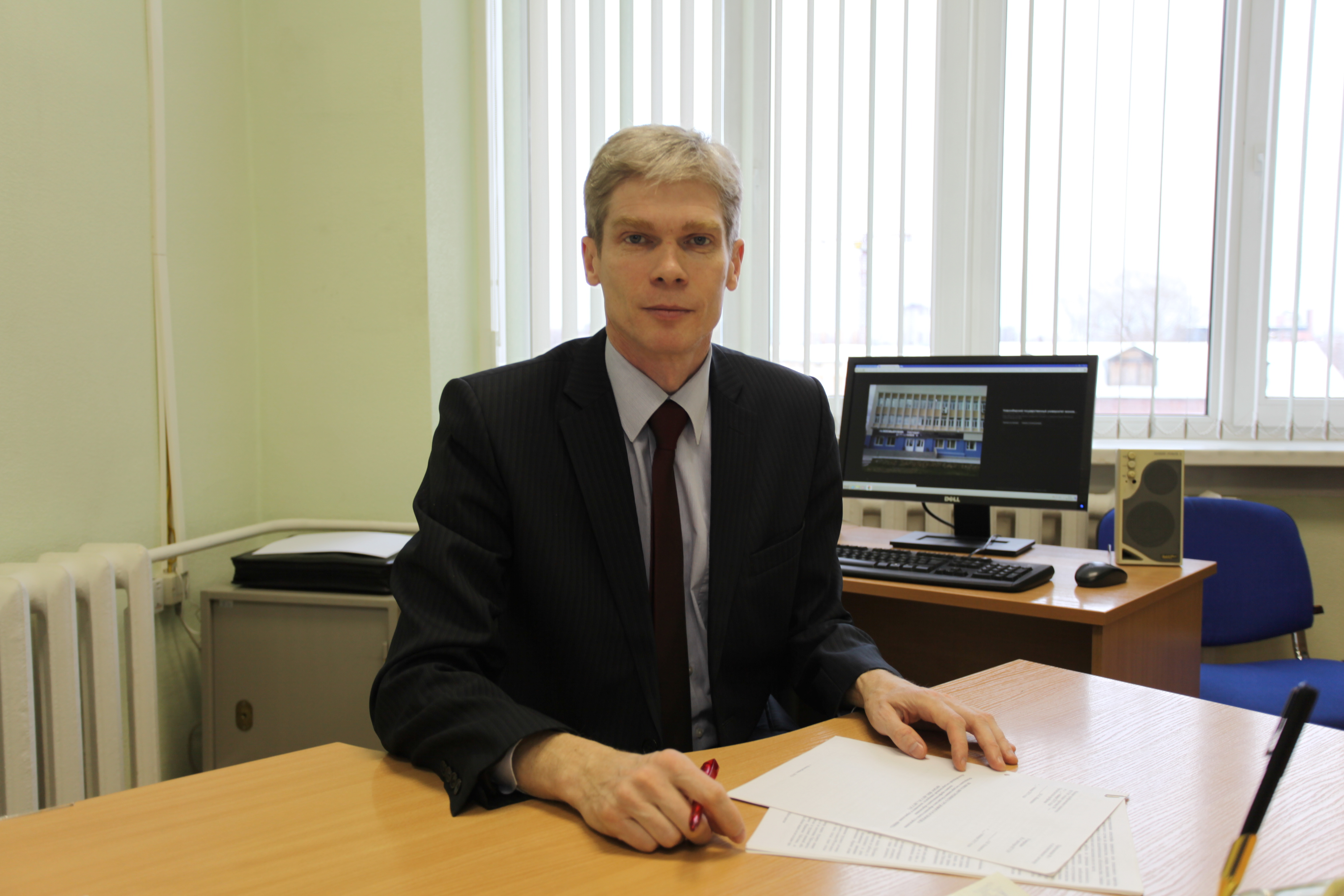 Декан юридического факультета НГУЭУ